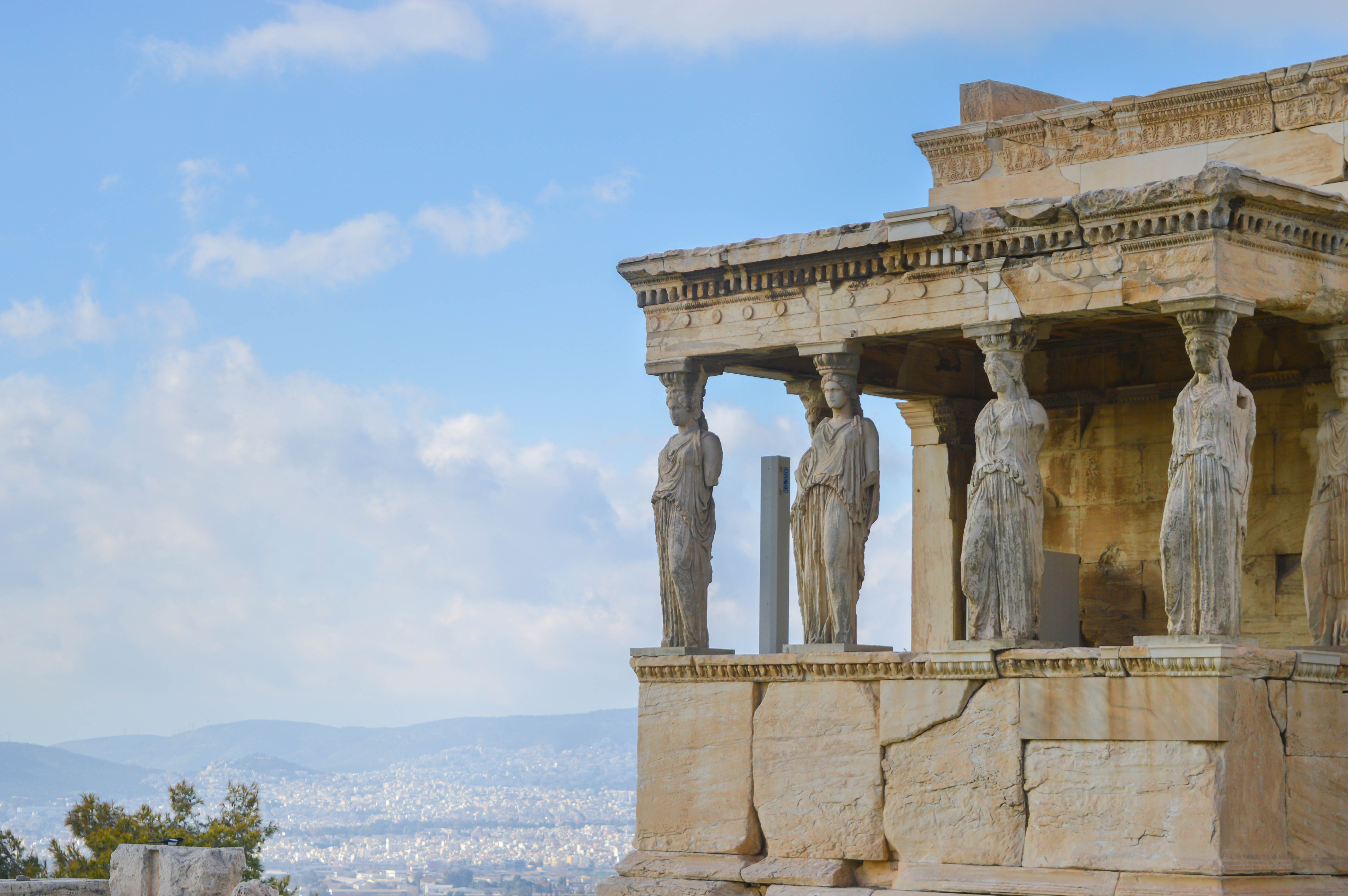 Ερέχθειο«Ερέχθειο»